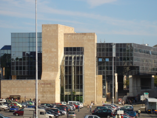 Le Palais de Justice du Mans, place des Jacobins